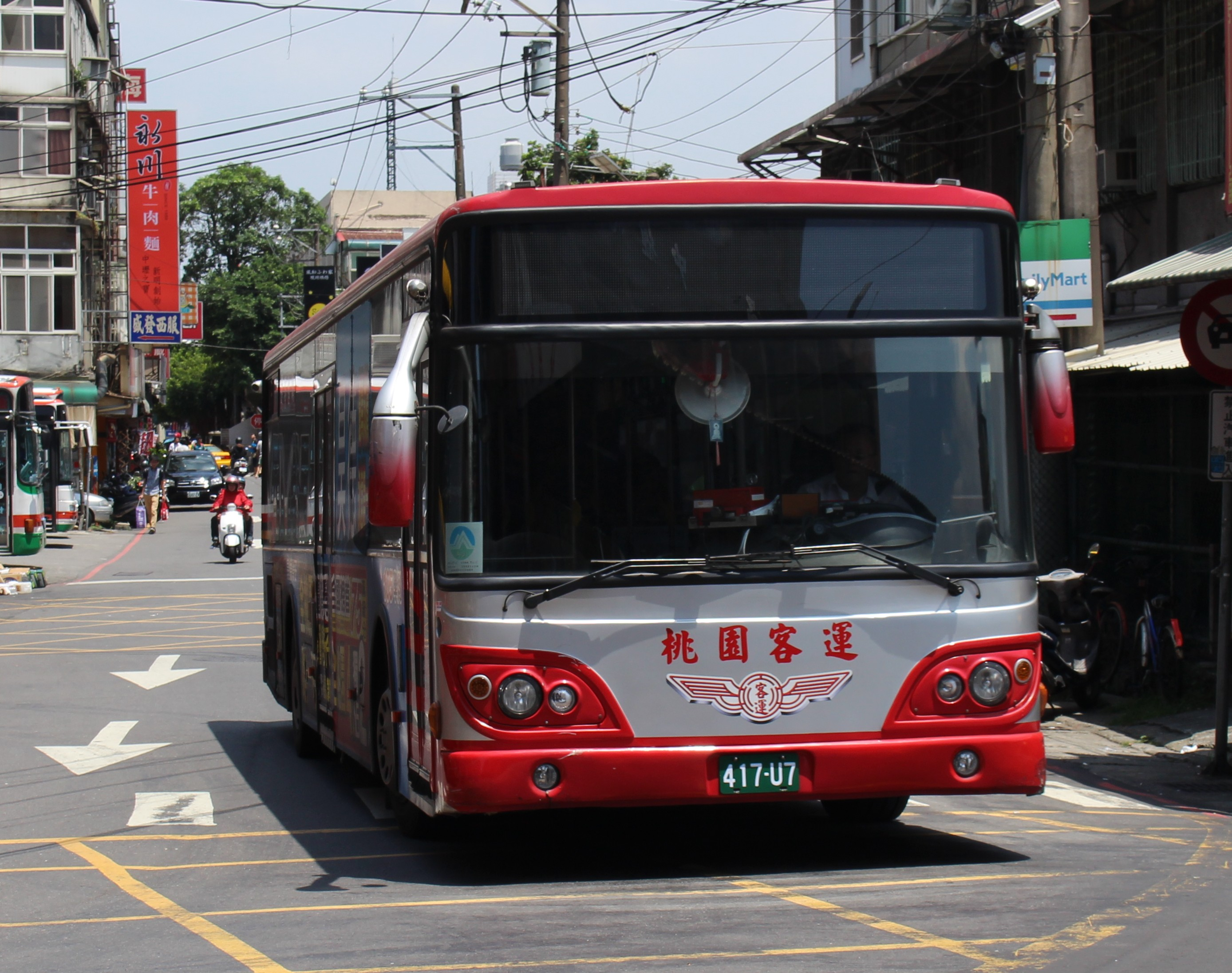 桃園客運2014 DAEWOO BS120CN 417-U7